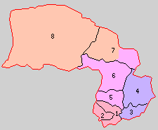 宮城県柴田郡の町村。